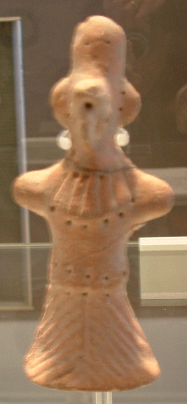 Terracotta figurines in Ancient time - Israeli National Maritime Museum. Haifa צלמיות בעת העתיקה, מאוסף המוזיאון הלאומי הימי בחיפה צלמית היא פסלון קטן ממדים בצלם אדם או בעל חיים. הצלמית יוצרה מחומרים שונים בעיקר טין, אבן ומתכת. על פי הצלמית ניתן ללמוד על מנהגי פולחן , אורחות חיים ומנהגים של התרבויות השונות לאורך ההיסטוריה. מקום הימצאן הפיזי כפי שהן נמצאות בעת חפירה ארכאולוגית מאפשר הסקת מסקנות לגבי השימושים של הצלמיות כגון, חפצי קדושה, קמע פוריות, קמע מזל ועוד. הצלמיות הקדומות ביותר במזרח הקרוב הופיעו בתקופה הניאוליתית קדם-קראמית (מחצית האלף ה-9 לפנה"ס – ועד סוף האלף ה-6 לפנה"ס) This image was taken as part of the Wikipedia Loves Art project and is uploaded curtesy of the National Maritime Museum in Haifa. In any use of this image credit need be given to the Musuem as well as the photographer. The copyright holder of this file allows anyone to use it for any purpose, provided that the copyright holder is properly attributed. Redistribution, derivative work, commercial use, and all other use is permitted. This image was taken as part of the Elef Millim project trip and within the Wikipedia Loves Art project to the National Maritime Museum in Haifa in the northern part of Israel, which was held on Friday, 22nd January 2010. To view all images uploaded as pary of the Elef Millim Project צלמית אשה מחרס מתקופת הברונזה התיכונה ב1 1900-1750 לפני הספירה. מצפון סוריה